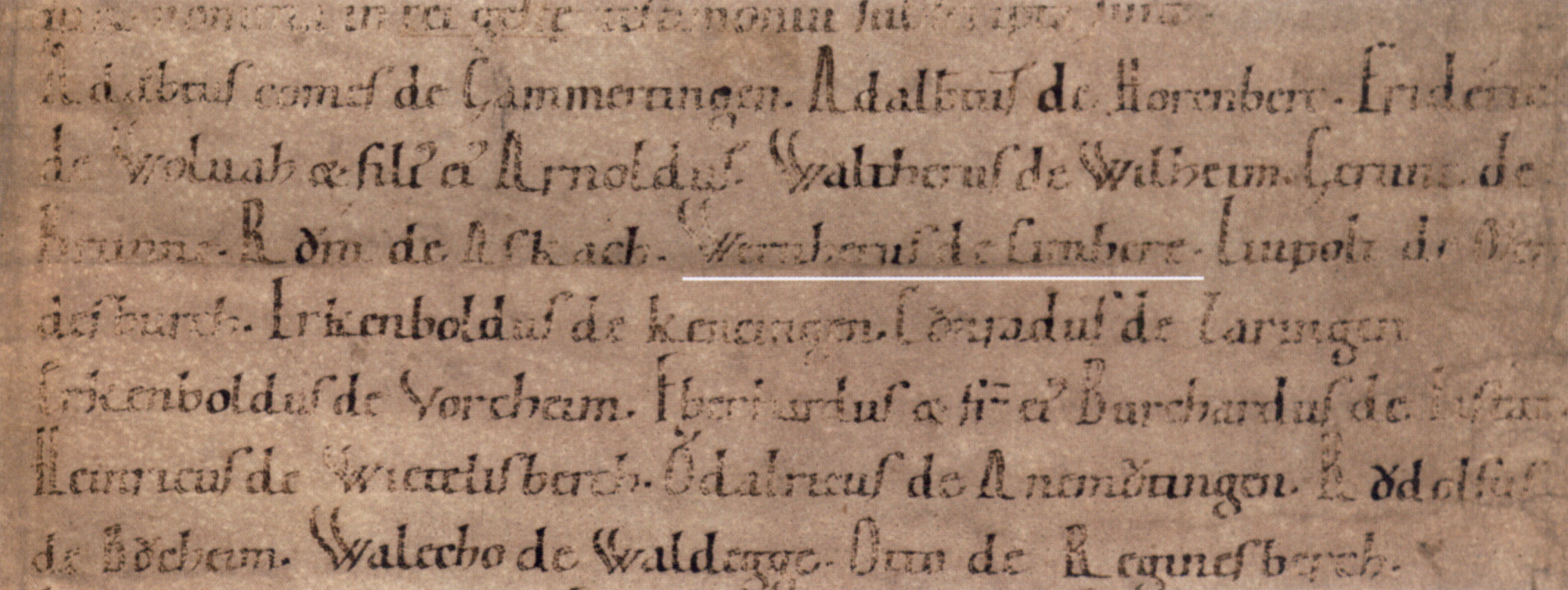 Rotulus Sanpetrinus, 11.–13. Jh.; Detail mit Nennung Werners von Zimmern, der 1113 Zeuge der Weihe der Klosterkirche St. Peter war; hier – nicht im Original – zur Verdeutlichung unterstrichen; Generallandesarchiv Karlsruhe, 14/4